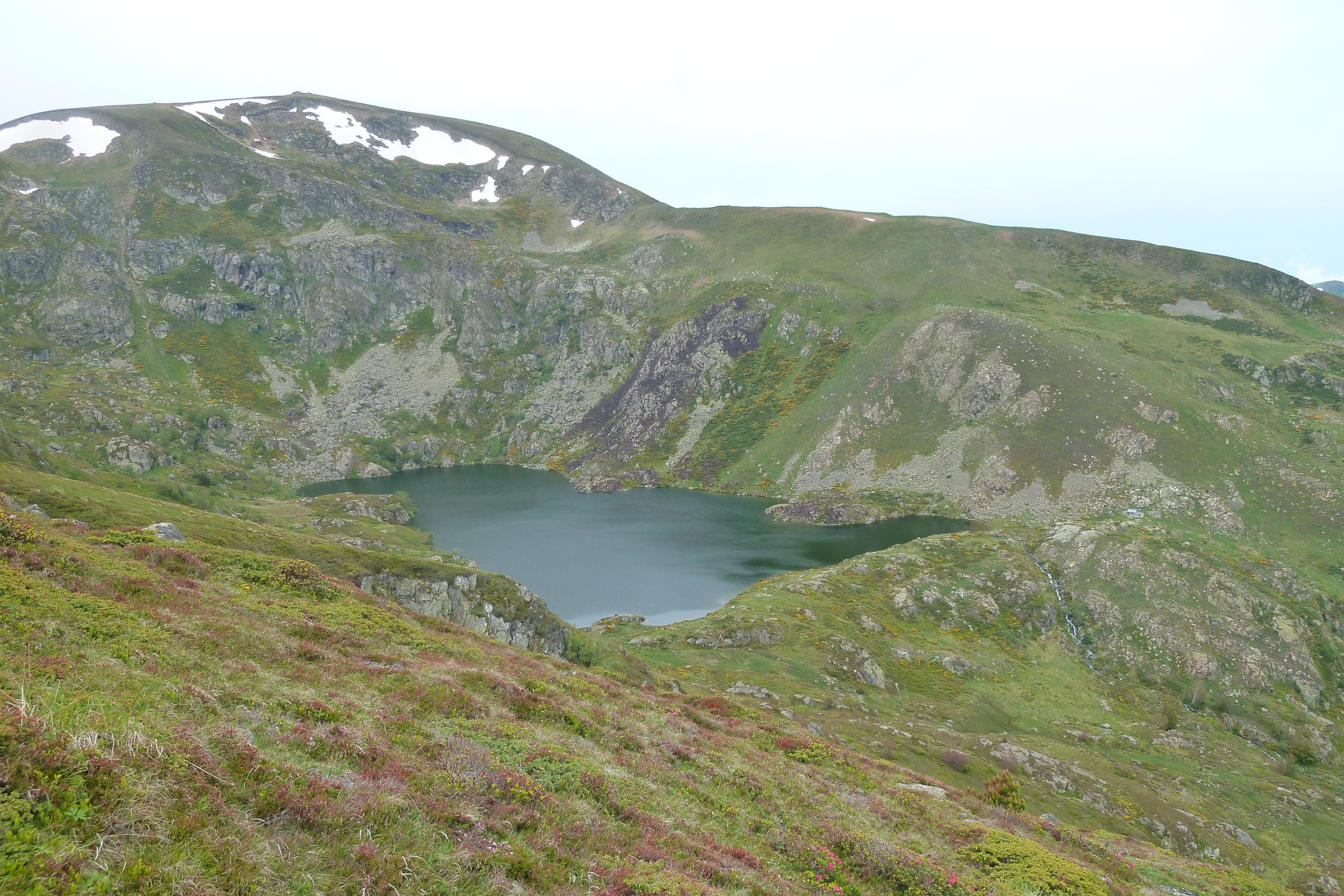 Étang d'Artats, Ariège, France